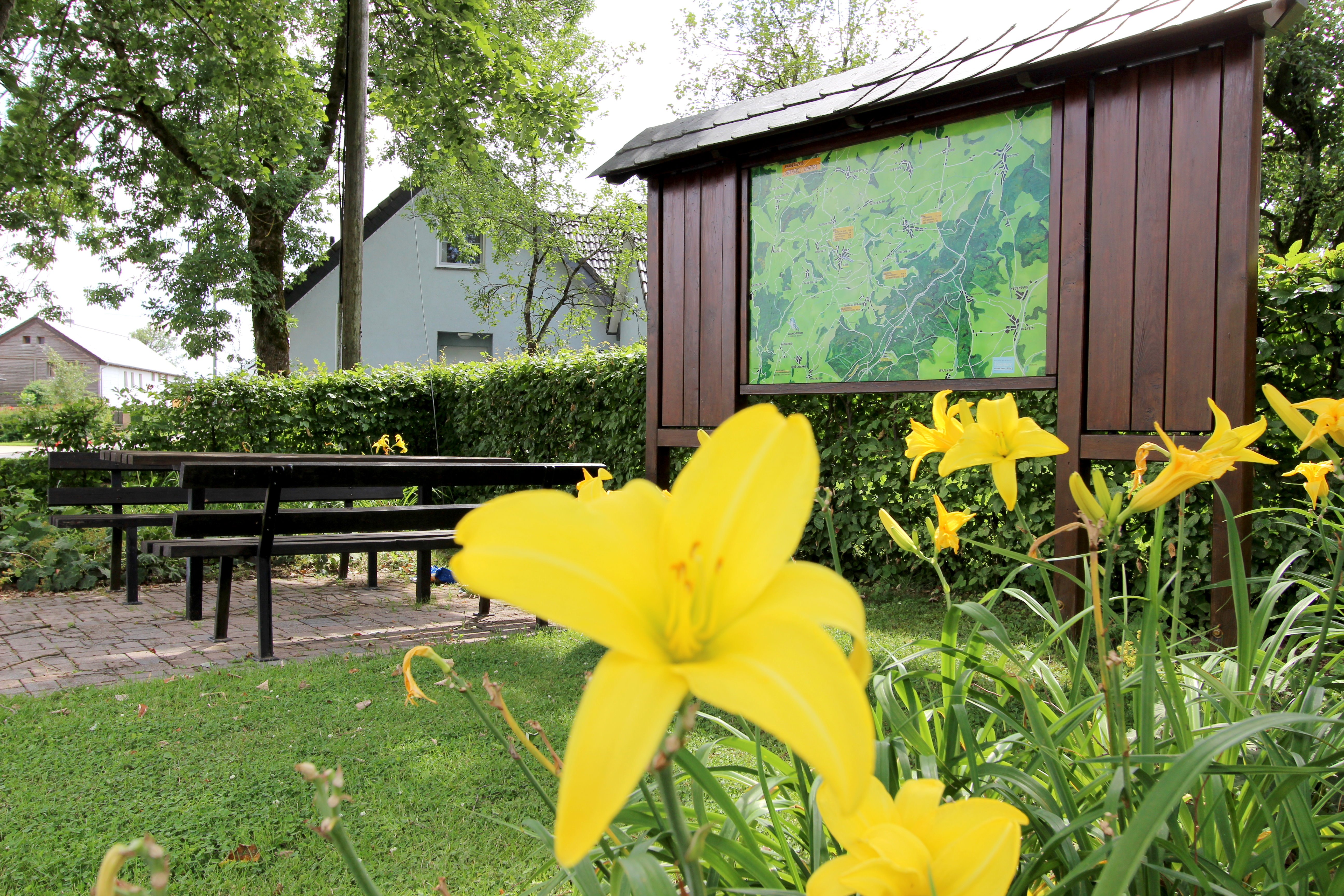 54597 Auw bei Prüm. Aufnahme von 2017.